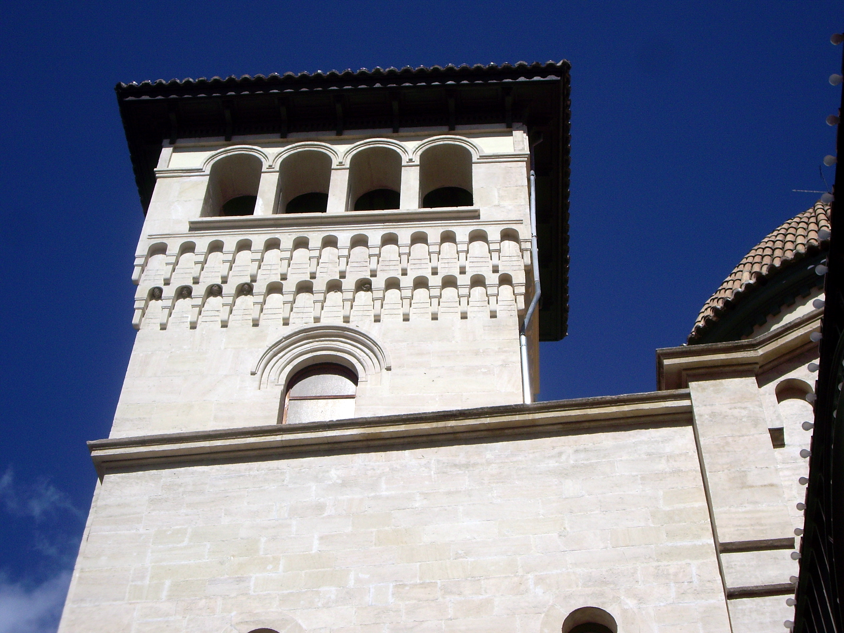 Campanar de l'església de Sant Jordi d'Alcoi